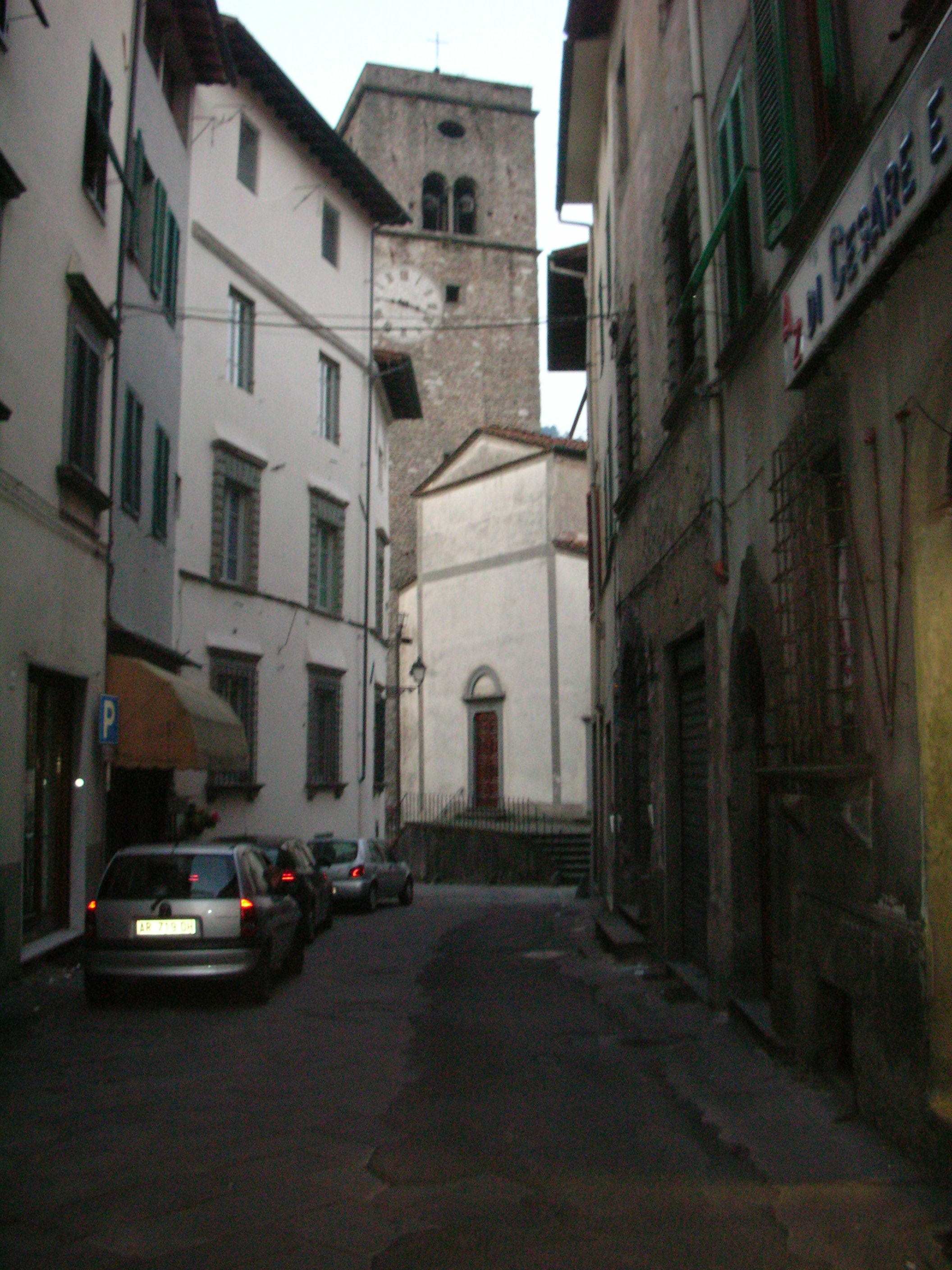 La Chiesa di San Iacopo a Borgo a Mozzano